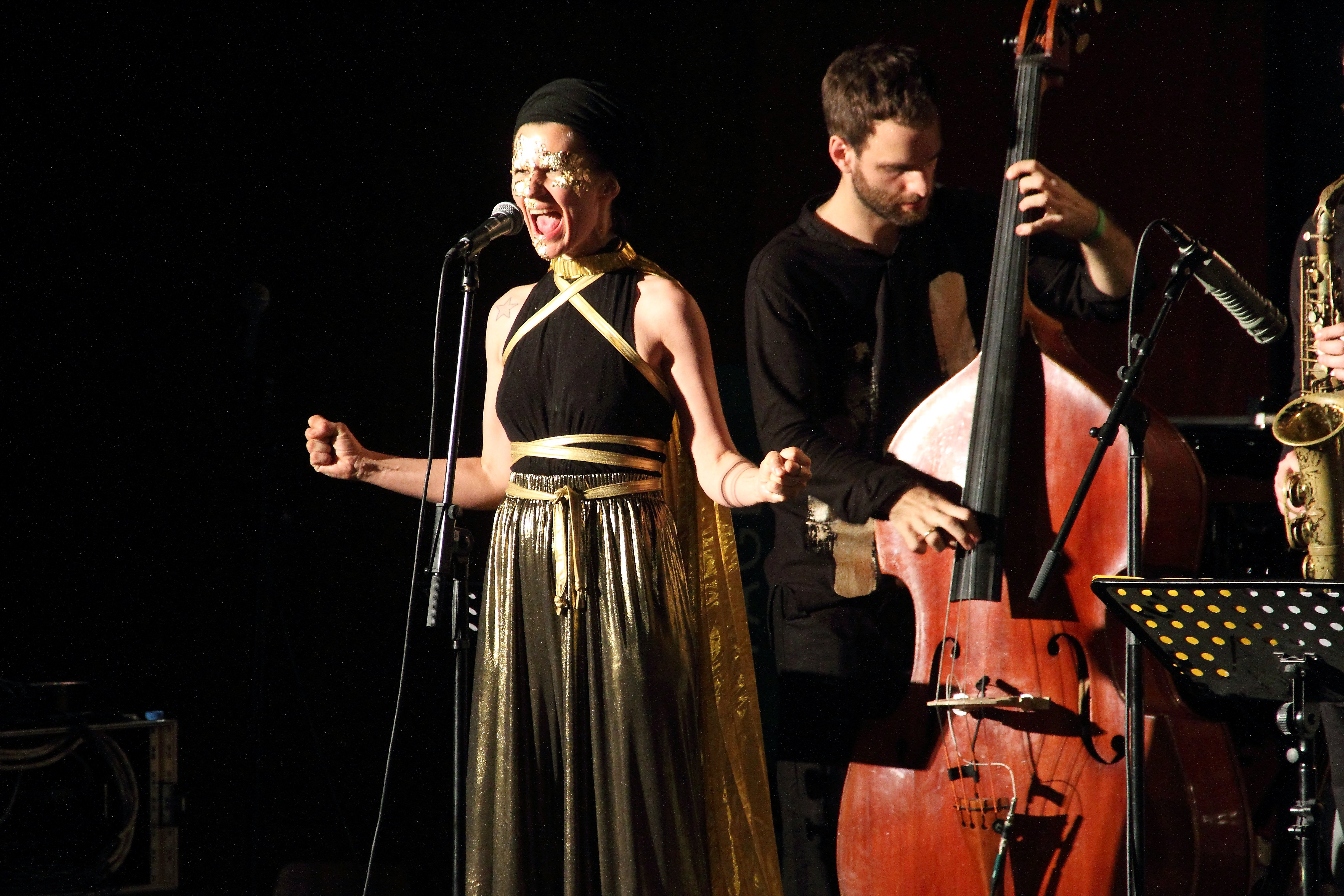 Shake Stew unter der Leitung von Lukas Kranzelbinder auf dem INNtöne Jazzfestival 2017.